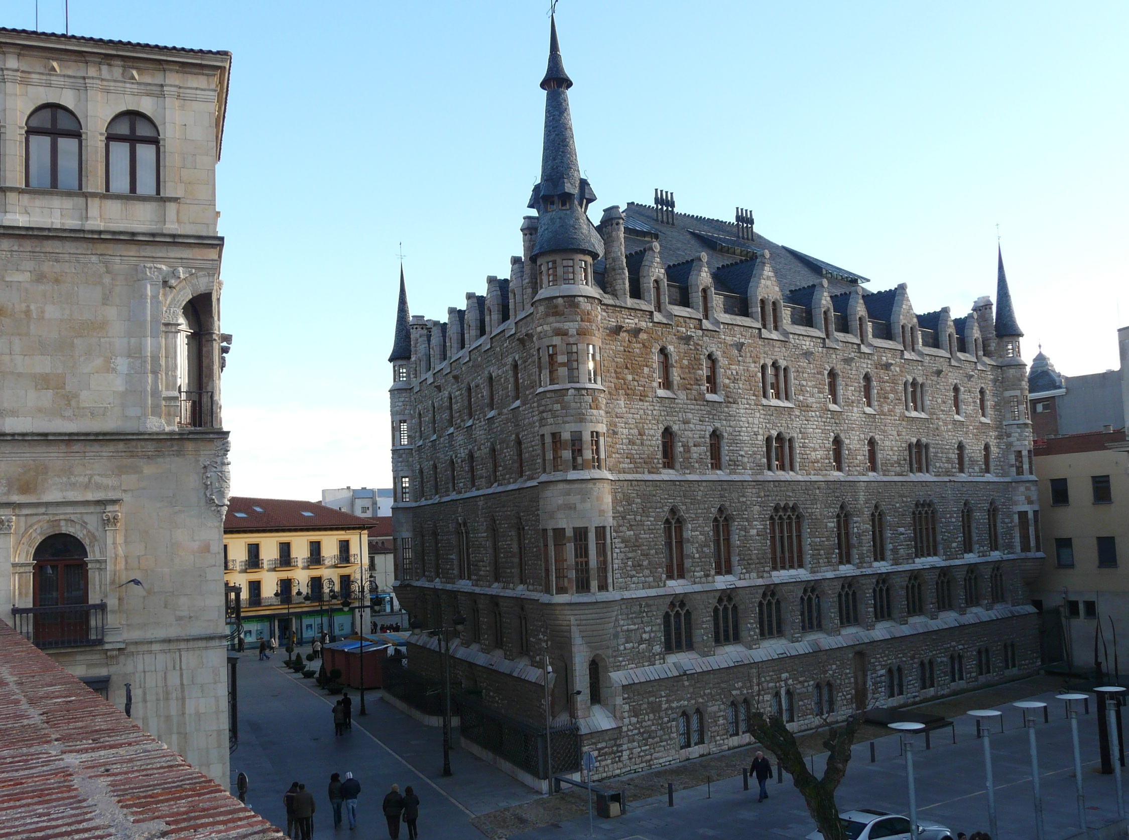 Casa Botines de León desde las murallas